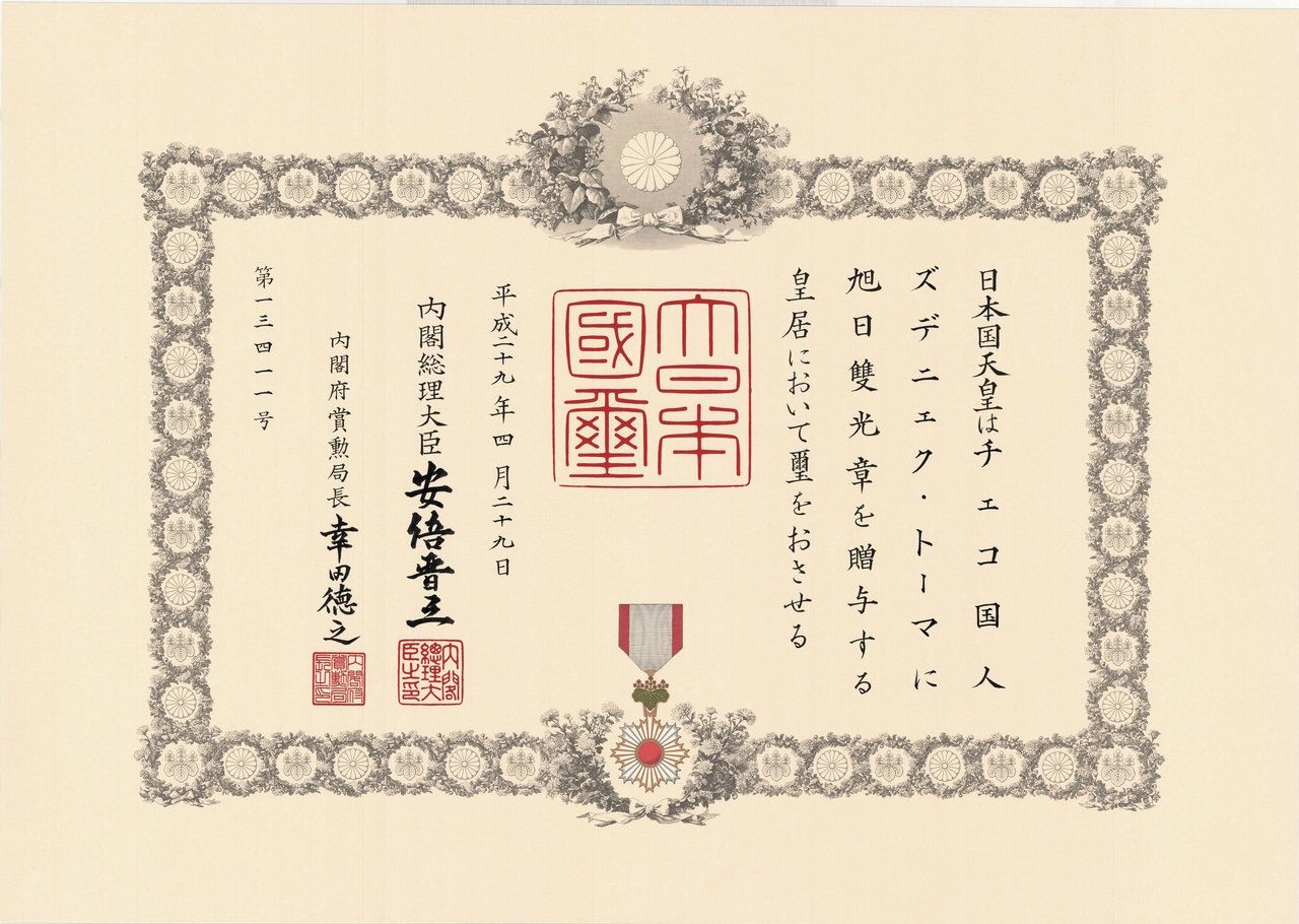 Řád Vychazejiciho-slunce - císařské osvědčení